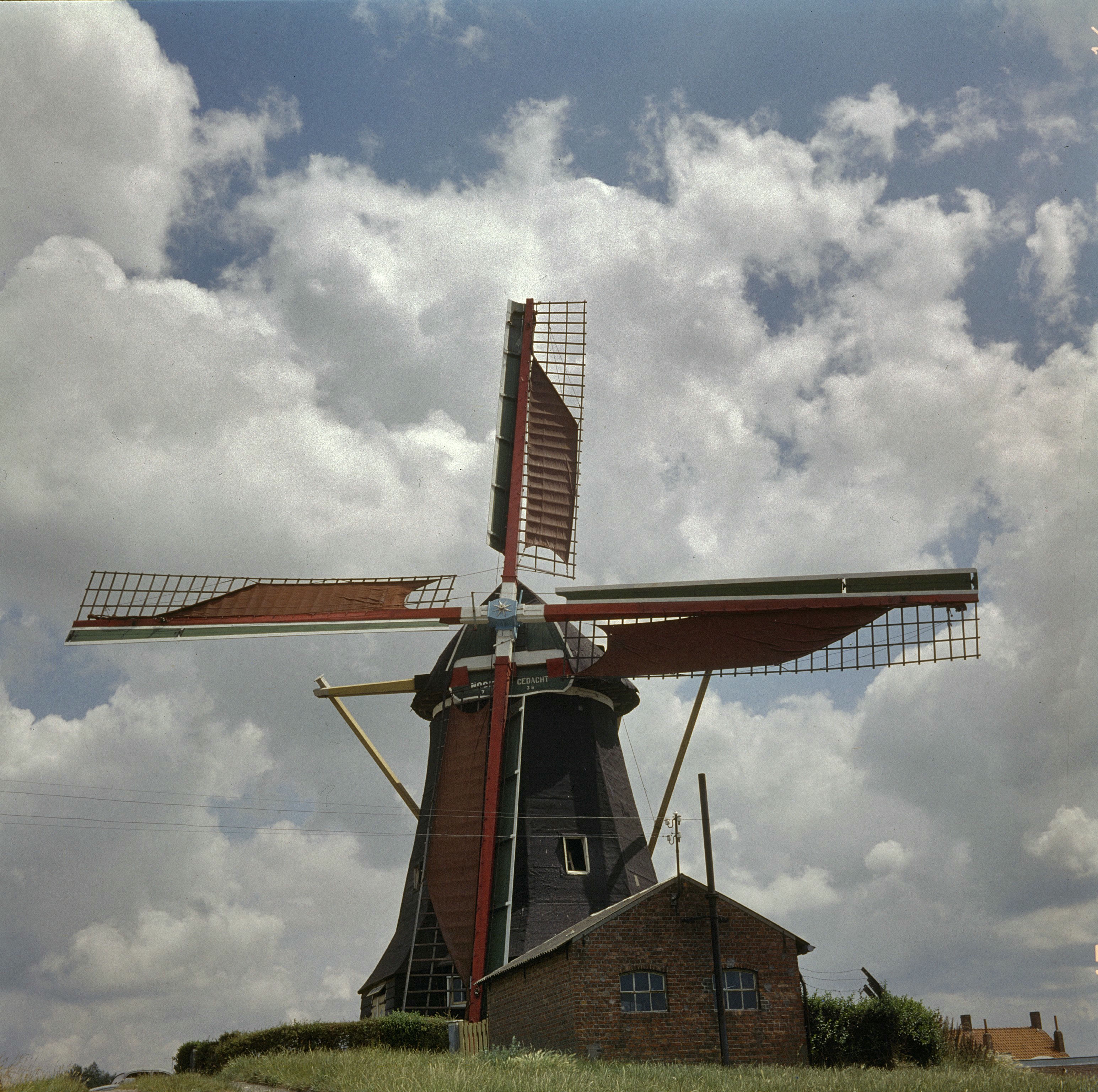 Nooitgedacht: Overzicht (opmerking: Diacollectie Molens)